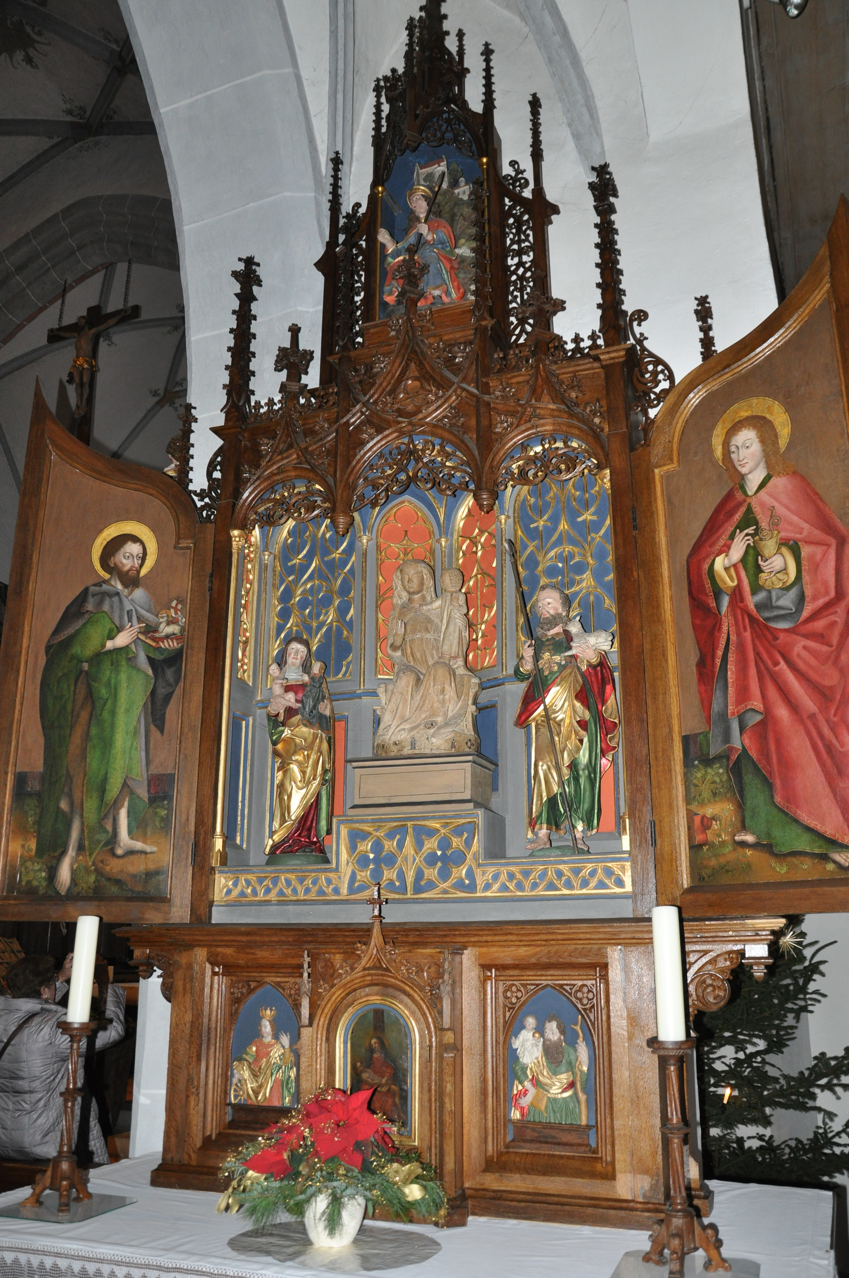 Pfarrkirche St. Martinus, Oberstadion (Alb-Donau-Kreis), Marienaltar Schrreinfiguren: Hl. Anna selbdritt (Anfang 16. Jh.), Madonna mit Kind (holzsichtig, Anfang 15. Jh.), Hl. Wendelin mit Schaf und Schippe (Anfang 16. Jh.) Flügel (Innenseite): Hl. Johannes der Täufer und Johannes der Evangelist, Jörg Stocker zugeschrieben, 1490er Jahre Predella: Hl. Katharina von Alexandrien und Hl. Christophorus, um 1520